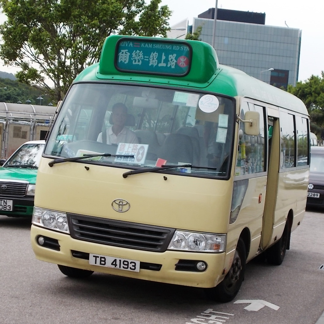 新界專線小巴602C線(即爾巒B線)，正停靠錦上路西鐵站